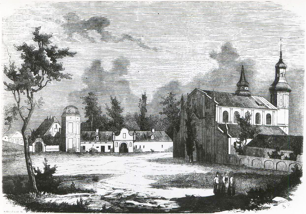 Беларуская (тарашкевіца): Бяроза Картуская (Biaroza Kartuskaja), вуліца Кляштарная (vulica Klaštarnaja). Кляштар картузаў